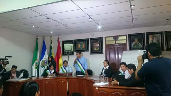 Concejo Municipal de San Julian